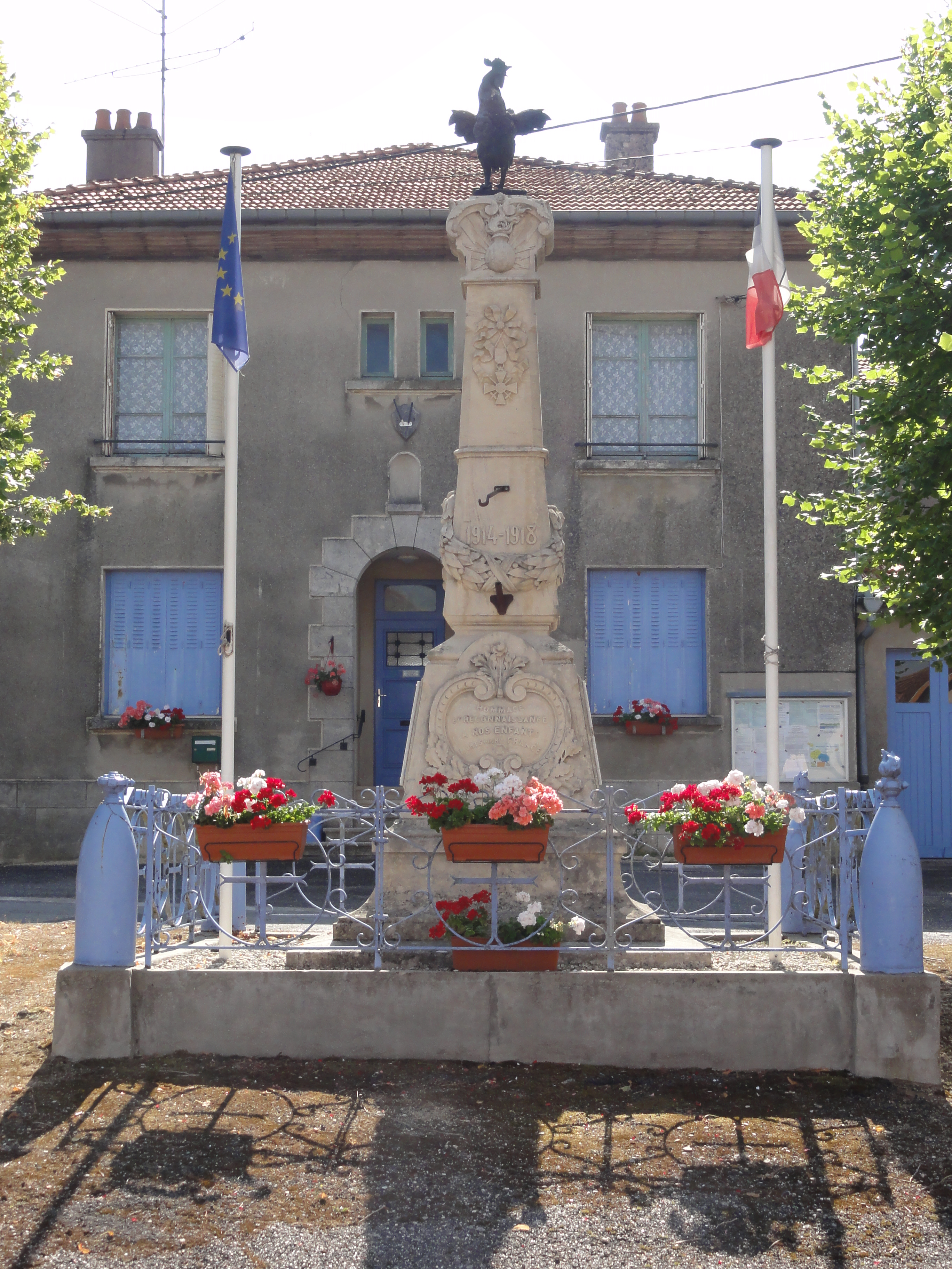 Woimbey (Meuse) monument aux morts (01) et mairie